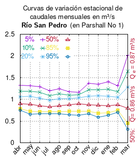 Curva de Variación Estacional Río San Pedro en Parshall No 1. # cita publicación # | apellido = Dirección General de Aguas # | nombre = # | enlace-autor = Ministerio de Obras Públicas (Chile) # | título = Diagnóstico y clasificación de los cursos y cuerpos de agua según objetivos de calidad. Cuenca del río Loa # | ubicación = Santiago de Chile # | editorial = Ministerio de Obras Públicas (Chile) # | año = 2004 # | edición = # | url = # | ref = harv # # usar : set key autotitle columnhead textcolor variable samplen 1 spacing 1 @keypos top maxrows 3 # Tabla 4.7: Río San Pedro en Parshall No 1 (m3/s), pág. 49 mes 5% 10% 20% 50% 85% 95% abr 1.320 1.190 1.065 0.902 0.785 0.744 may 1.308 1.192 1.071 0.888 0.725 0.652 jun 1.294 1.158 1.026 0.849 0.720 0.673 jul 1.196 1.086 0.977 0.828 0.715 0.672 ago 1.248 1.129 1.012 0.848 0.720 0.671 sep 1.170 1.096 1.013 0.871 0.723 0.648 oct 1.162 1.103 1.033 0.897 0.731 0.633 nov 1.374 1.219 1.070 0.870 0.724 0.671 dic 1.353 1.218 1.078 0.865 0.677 0.591 ene 1.411 1.237 1.069 0.847 0.687 0.630 feb 1.314 1.178 1.047 0.872 0.744 0.698 mar 2.015 1.642 1.282 0.798 0.445 0.316 This plot was created with Gnuplot.